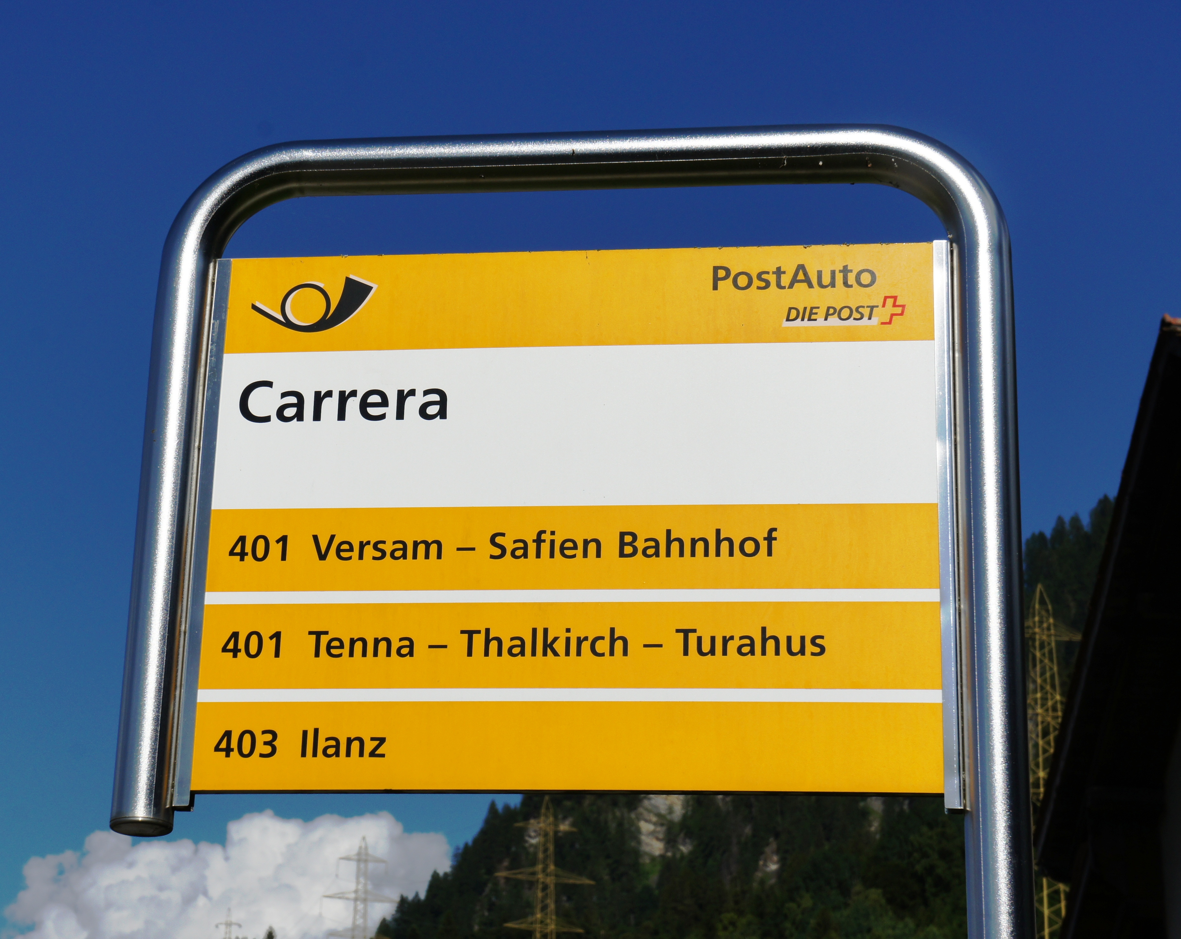 Schild an der Postautohaltestelle in Carrera.